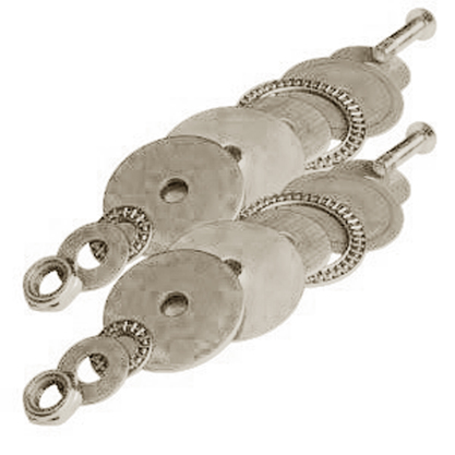 Стритборд стальные подшипники стандарта WSA